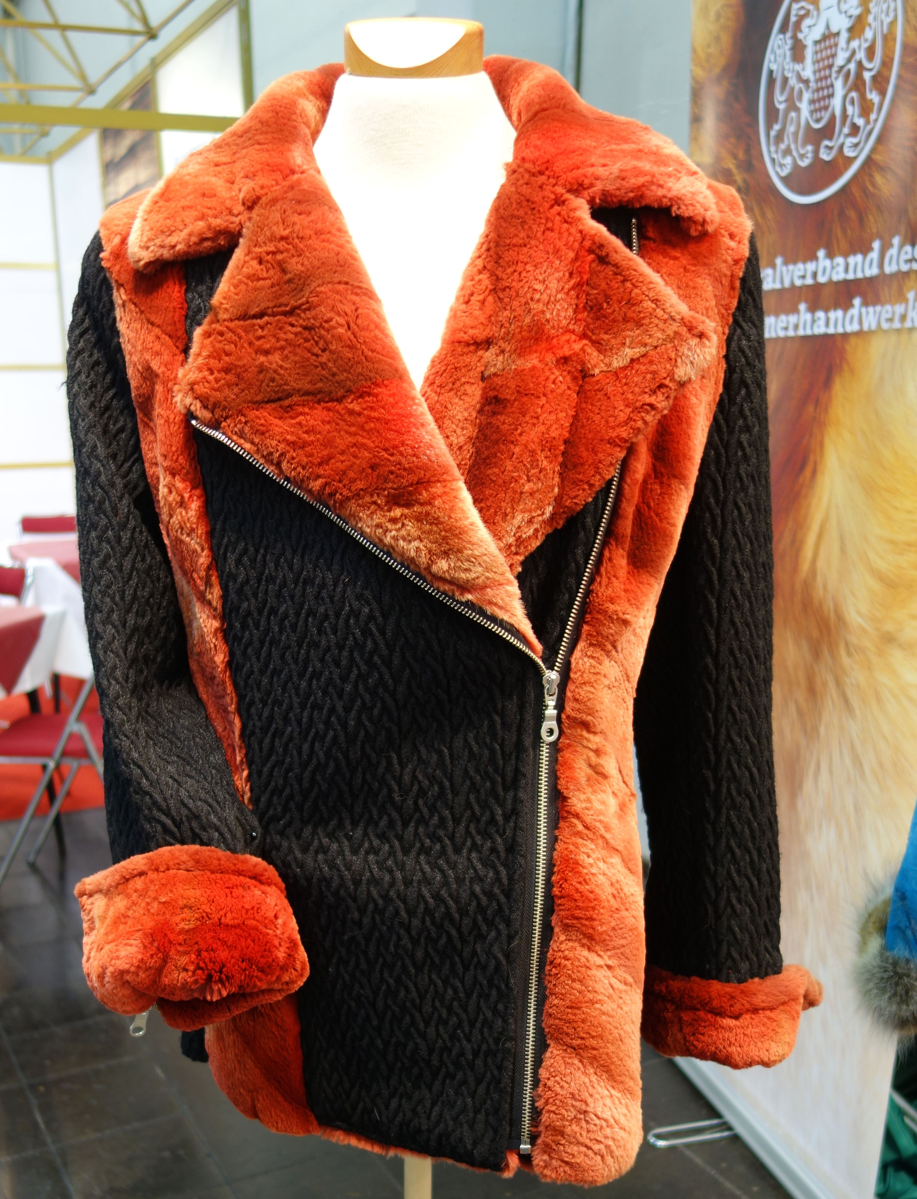 International German Red Fox Award 2016. Im Rahmen der Messe „Jagd & Hund“, Westfalenhallen Dortmund. Ausrichter: Zentralverband des Kürschnerhandwerks. Bikerjacke aus rot gefärbtem Samtbisam mit schwarzem Strick. Designer: Egon Samabor, Regensburg.